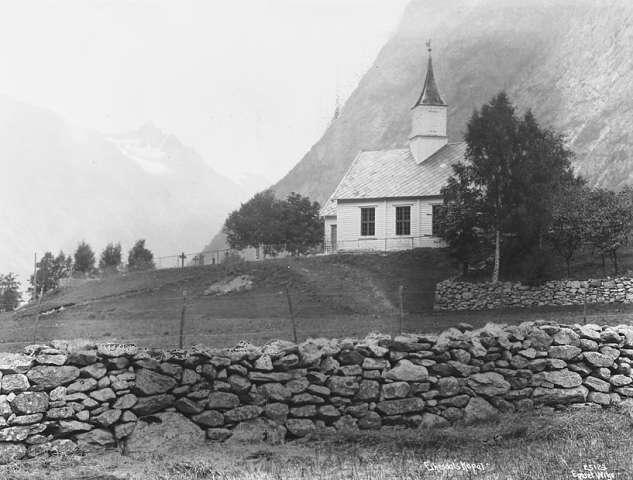 Eikesdal kyrkje (då Eikesdal kapell) fotografert i 1924